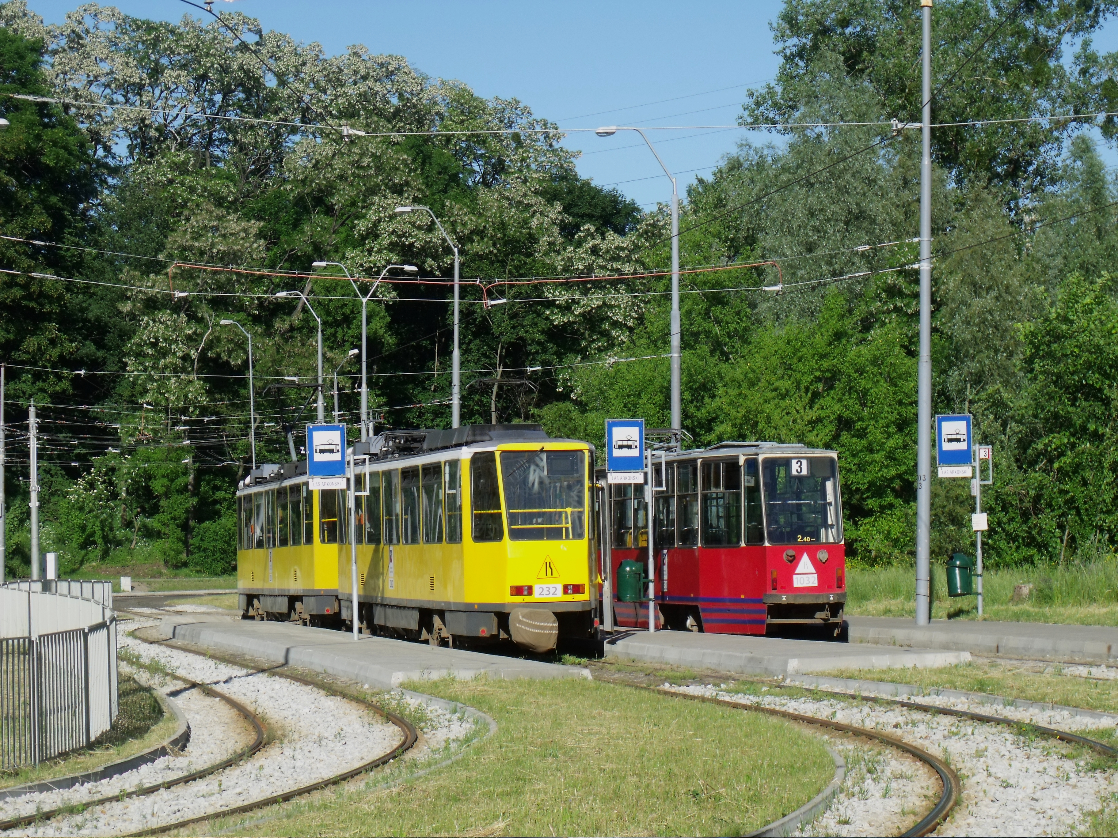 Skład wagonów Tatra T6A2D i 105N na pętli Las Arkoński